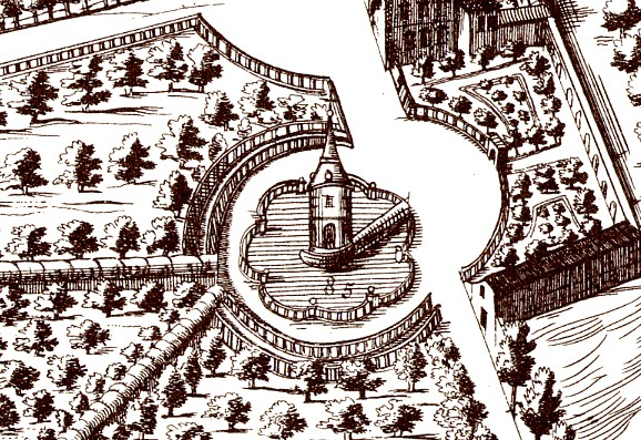 Detalle del Estanque Ochavado (perteneciente al Palacio y jardines del Buen Retiro), en el Plano de la villa de Madrid, dibujado por Pedro Teixeira Albernaz en 1656, por encargo de Felipe IV de España. Se identifican sus calles, plazas y edificios, muchos señalados con sus nombres. El plano está realizado en perspectiva caballera, de sur a norte. Está grabado en 20 planchas de 45x56 cm cada una, midiendo 2,85 x 1,80 metros, a una escala de 1:1.800.